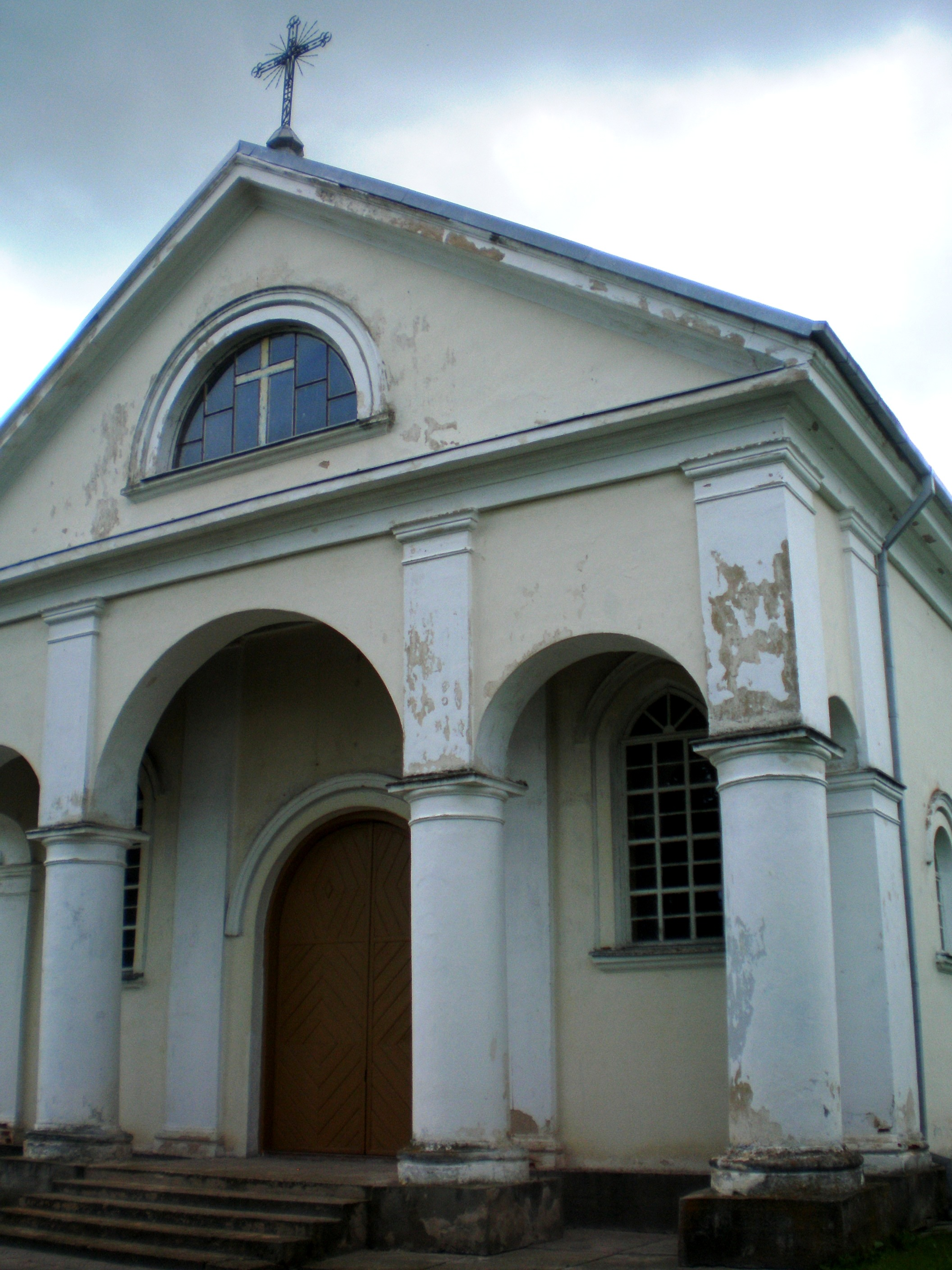 Šlapaberžės bažnyčia, Kėdainių raj.